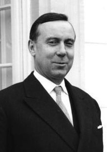 Besuch des französischen Premierministers Debré in Bonn am 7.10.1960 Im Bild: Der französische Premierminister und Bundeskanzler Konrad Adenauer auf der Terrasse des Bundeskanzleramtes Information added by Wikimedia users.